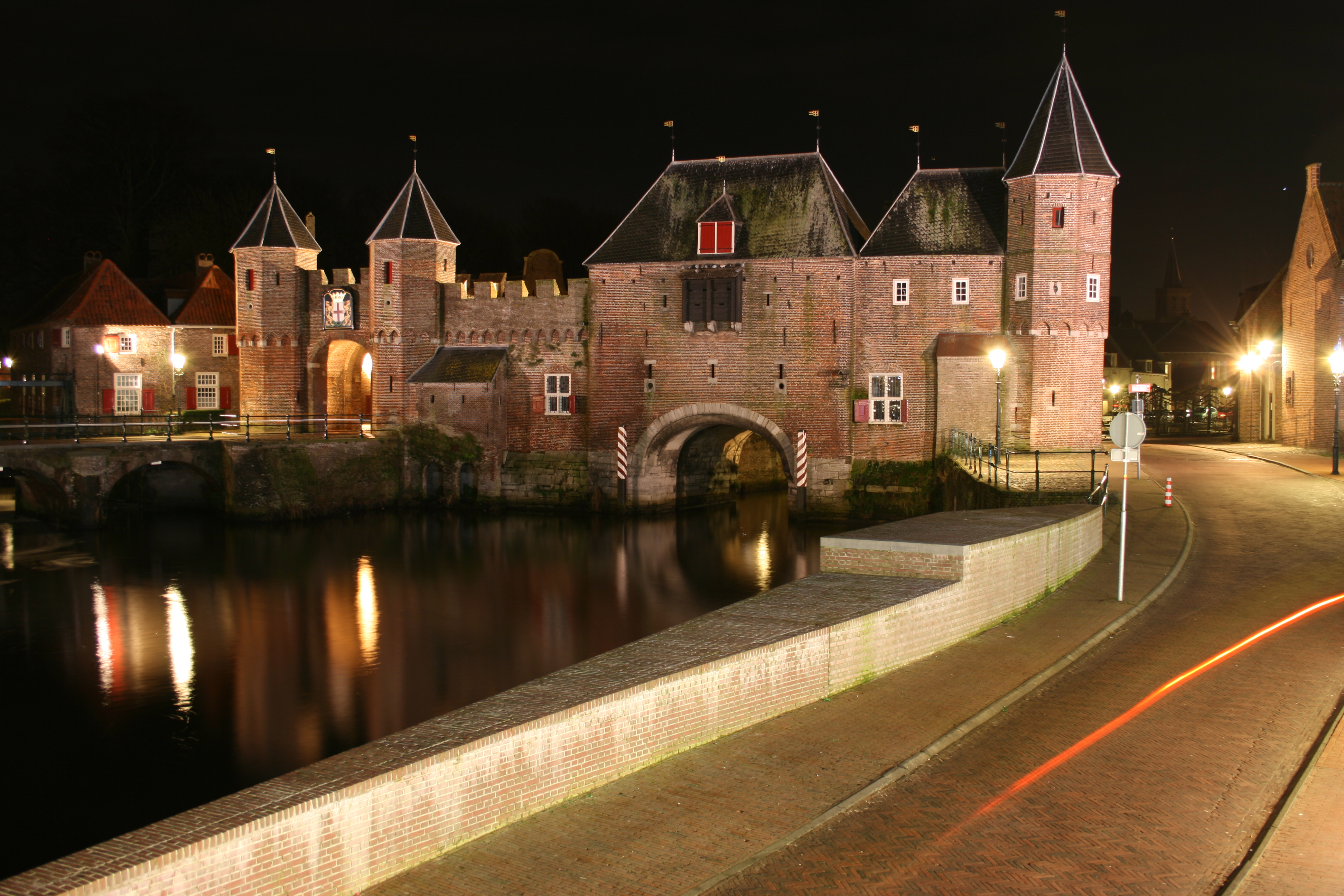 Op een winteravond